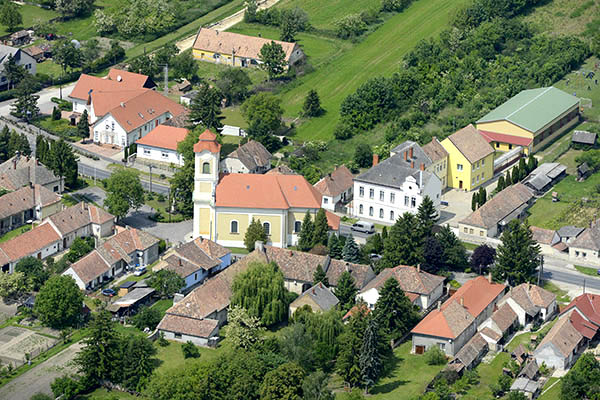 Légi fotó